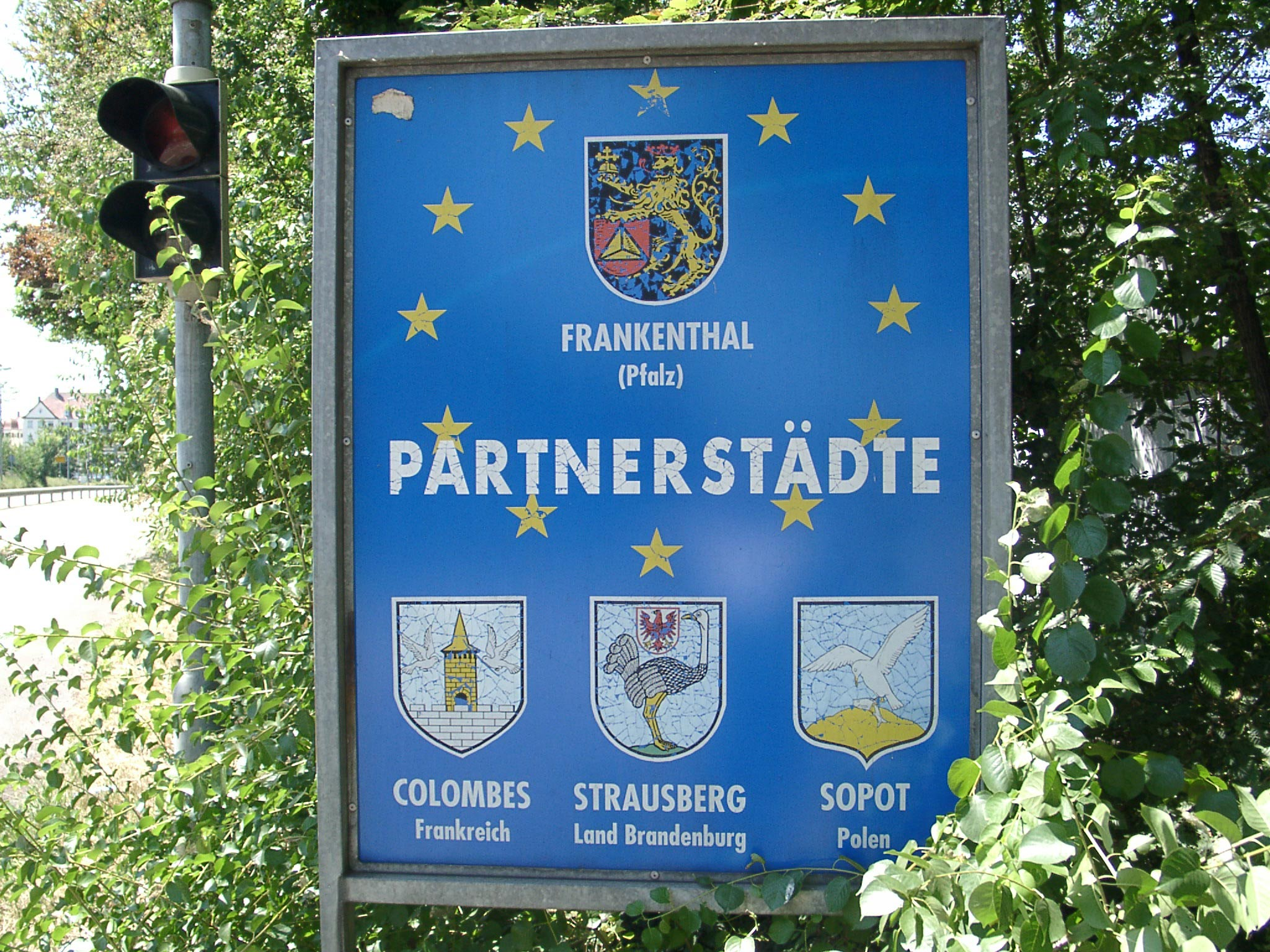 Tafel mit Wappen von Frankenthal (Pfalz) und seinen Partnerstädten